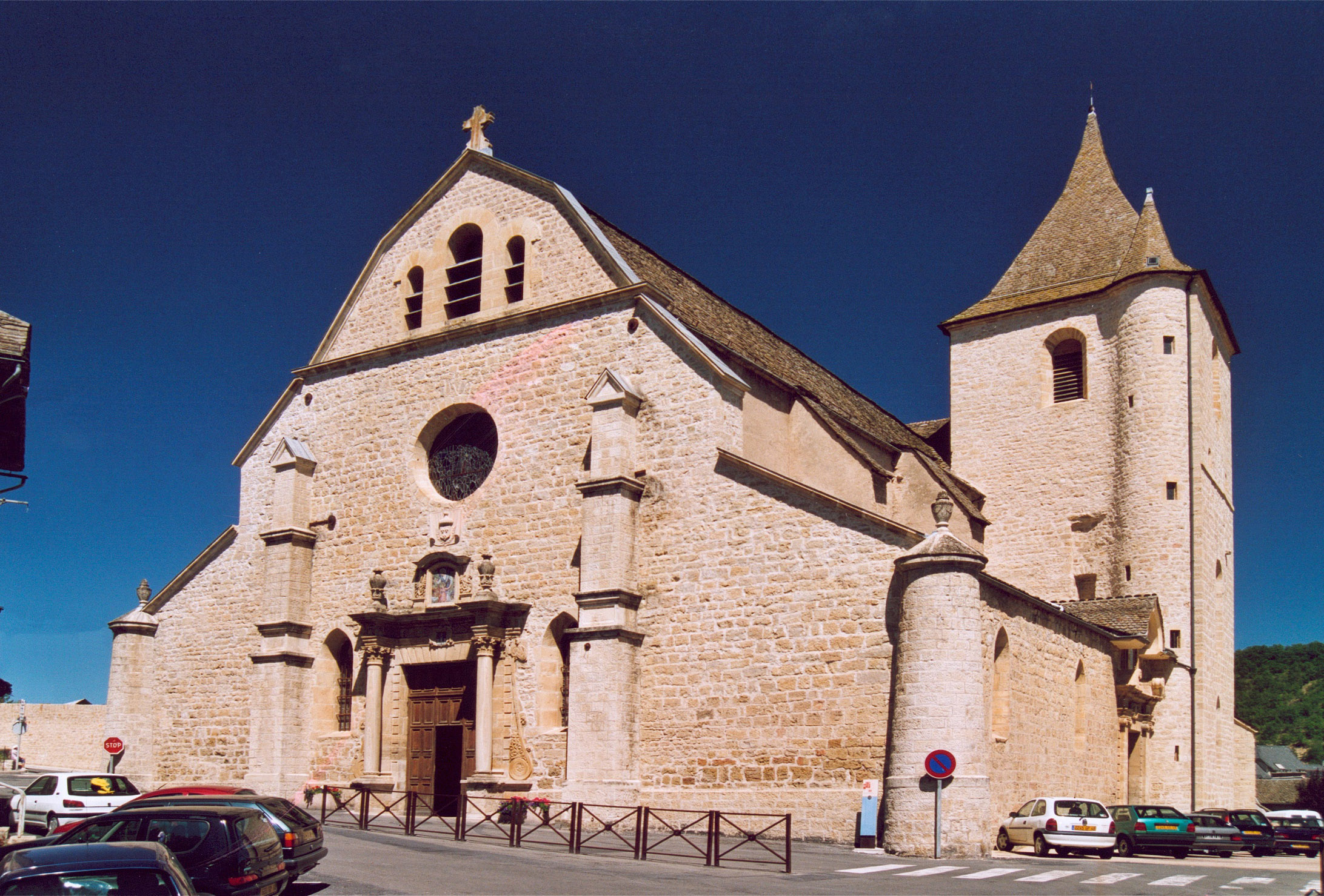 France Lozère Marvejols L'église Notre Dame de la Carce